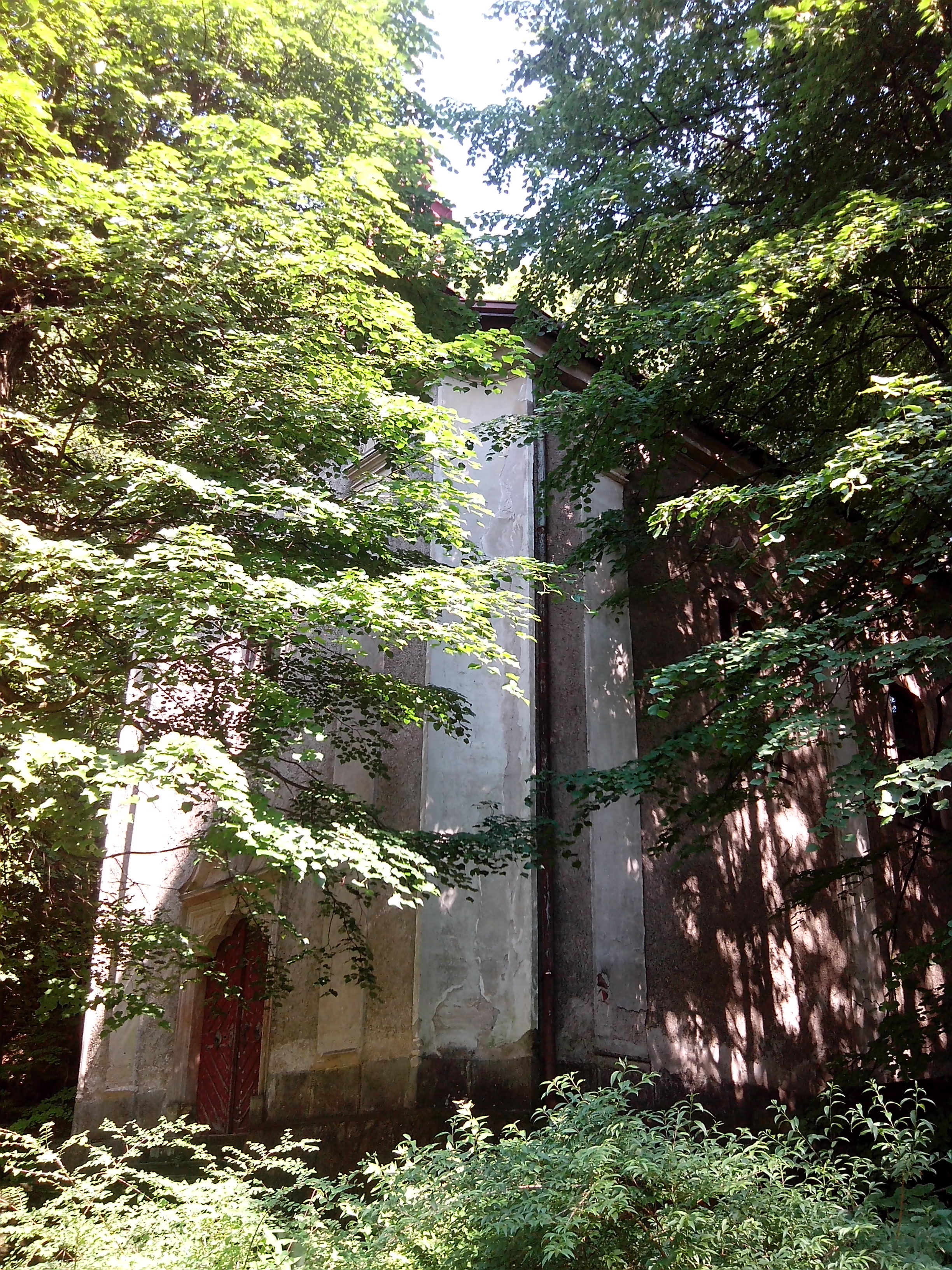 Rezek - kaple sv. Barbory